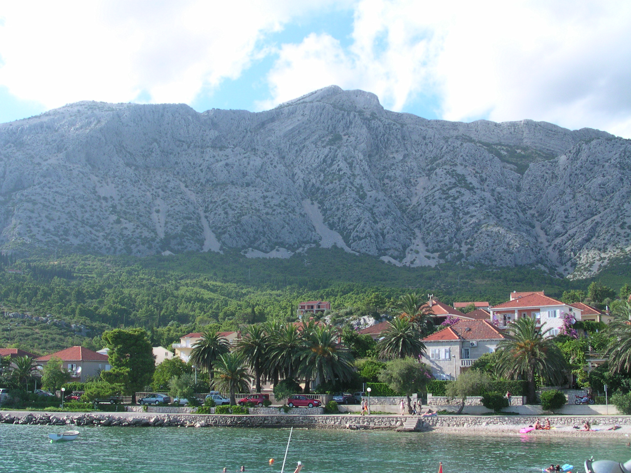 Sveti Ilija